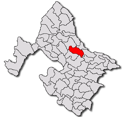 Categorie:Hărţi ale judeţului Mehedinţi